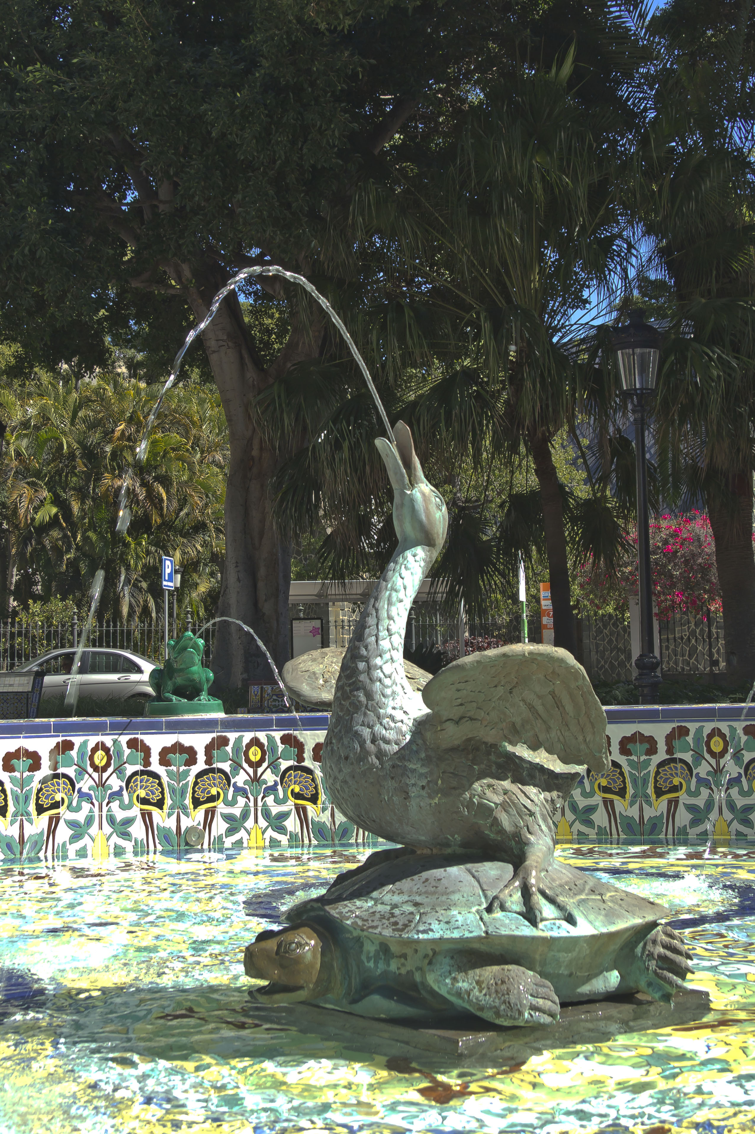 Zentrale Figurengruppe des Brunnens auf der Plaza 25 de Julio in Santa Cruz de Tenerife